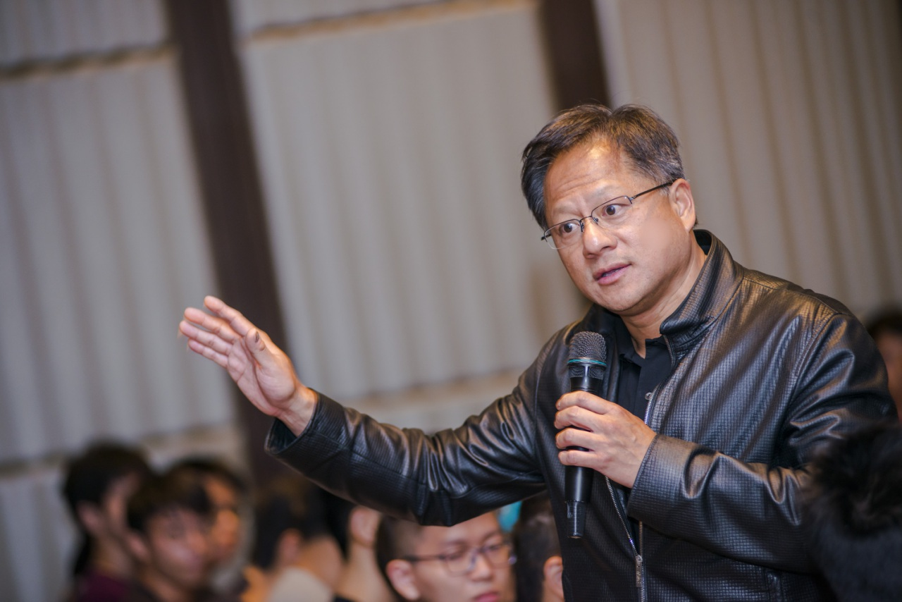 2016台北國際電腦展，NVIDIA CEO黃仁勳。